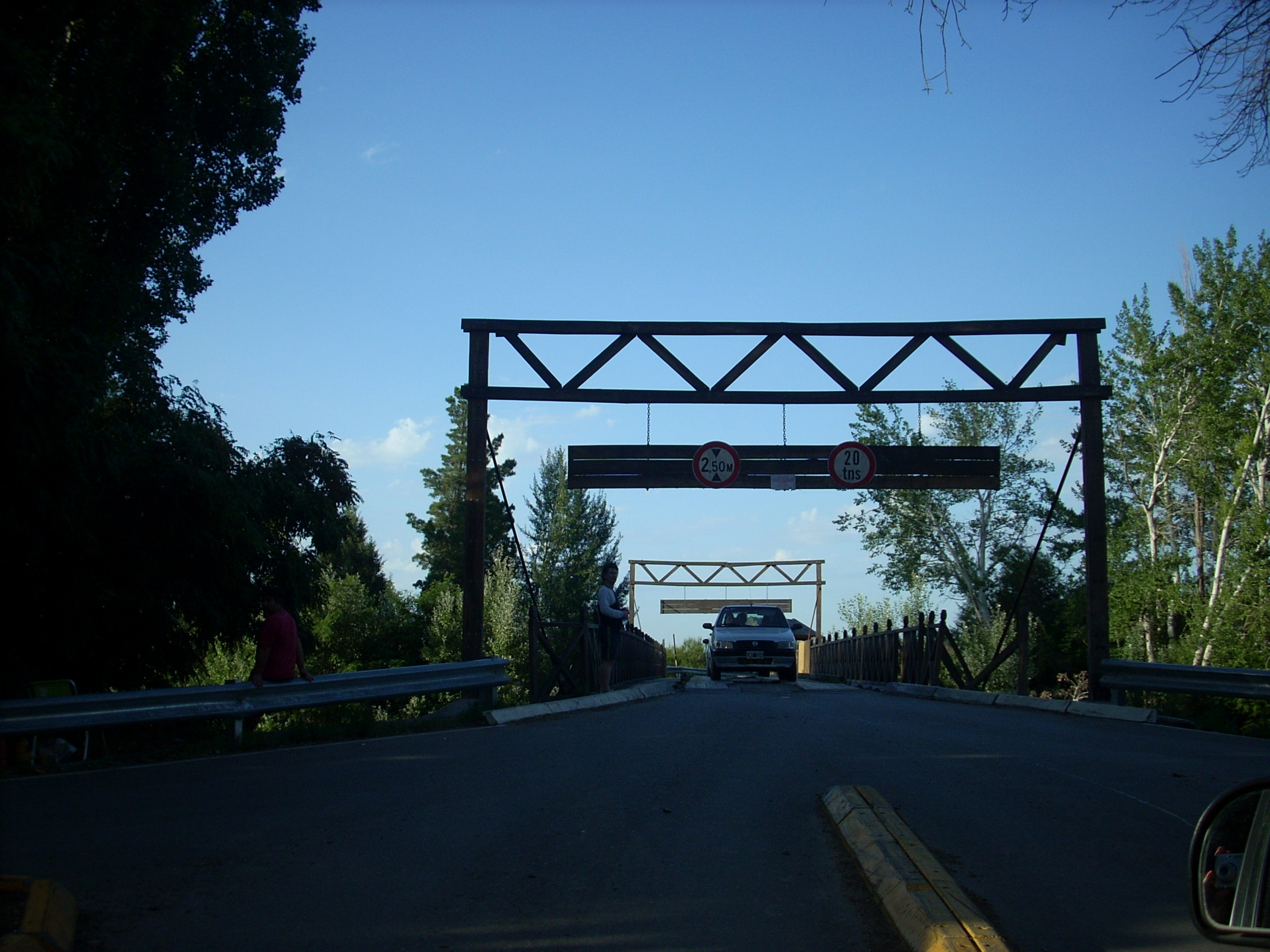 Vista del Puente Hendre